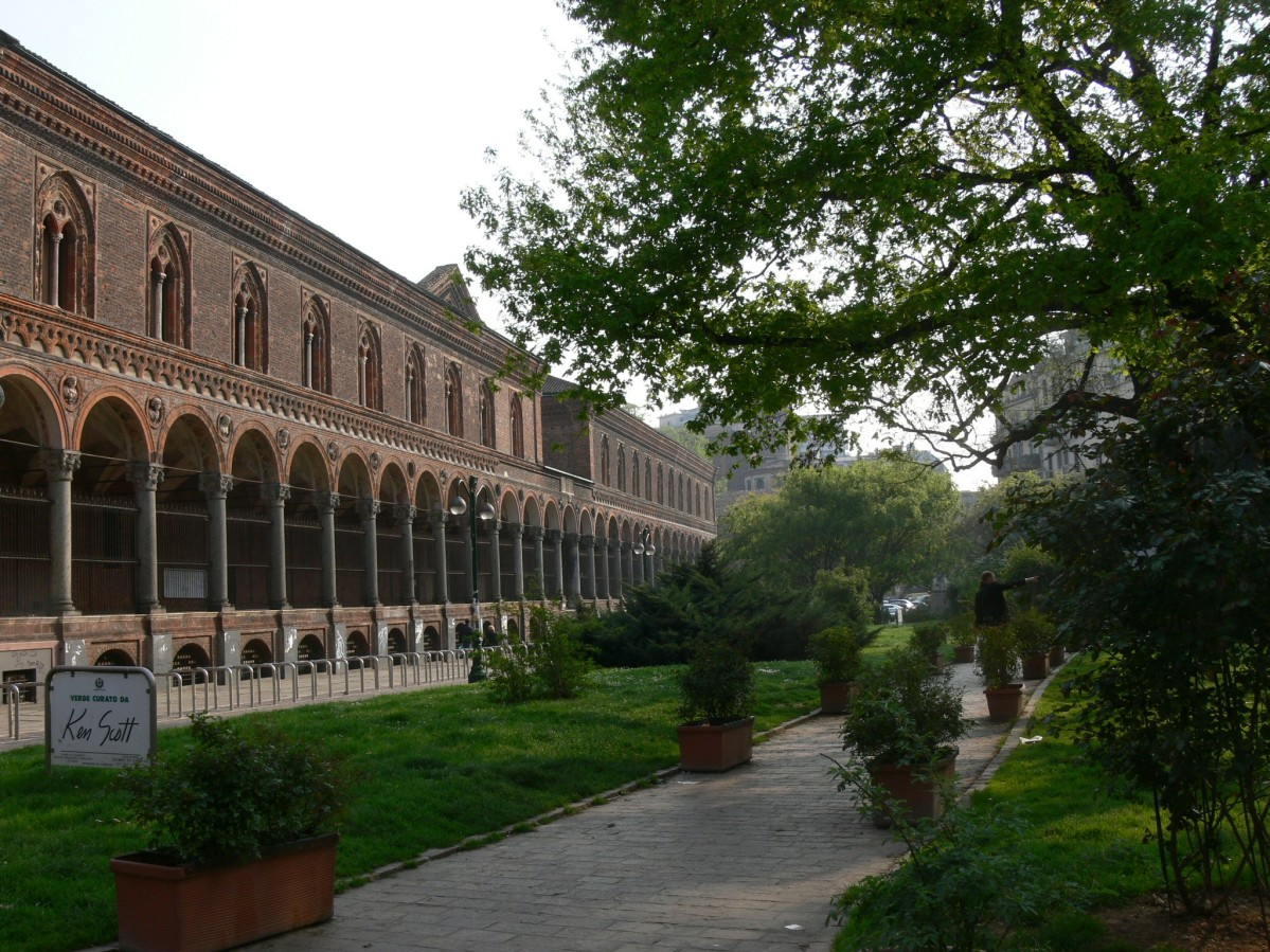 Ex Ospedale Maggiore di Milano, Costruito nel 1456 dal duca di Milano Francesco Sforza è ora sede dell'Università Statale di Milano. Via Festa del Perdono una delle più belle vie di Milano